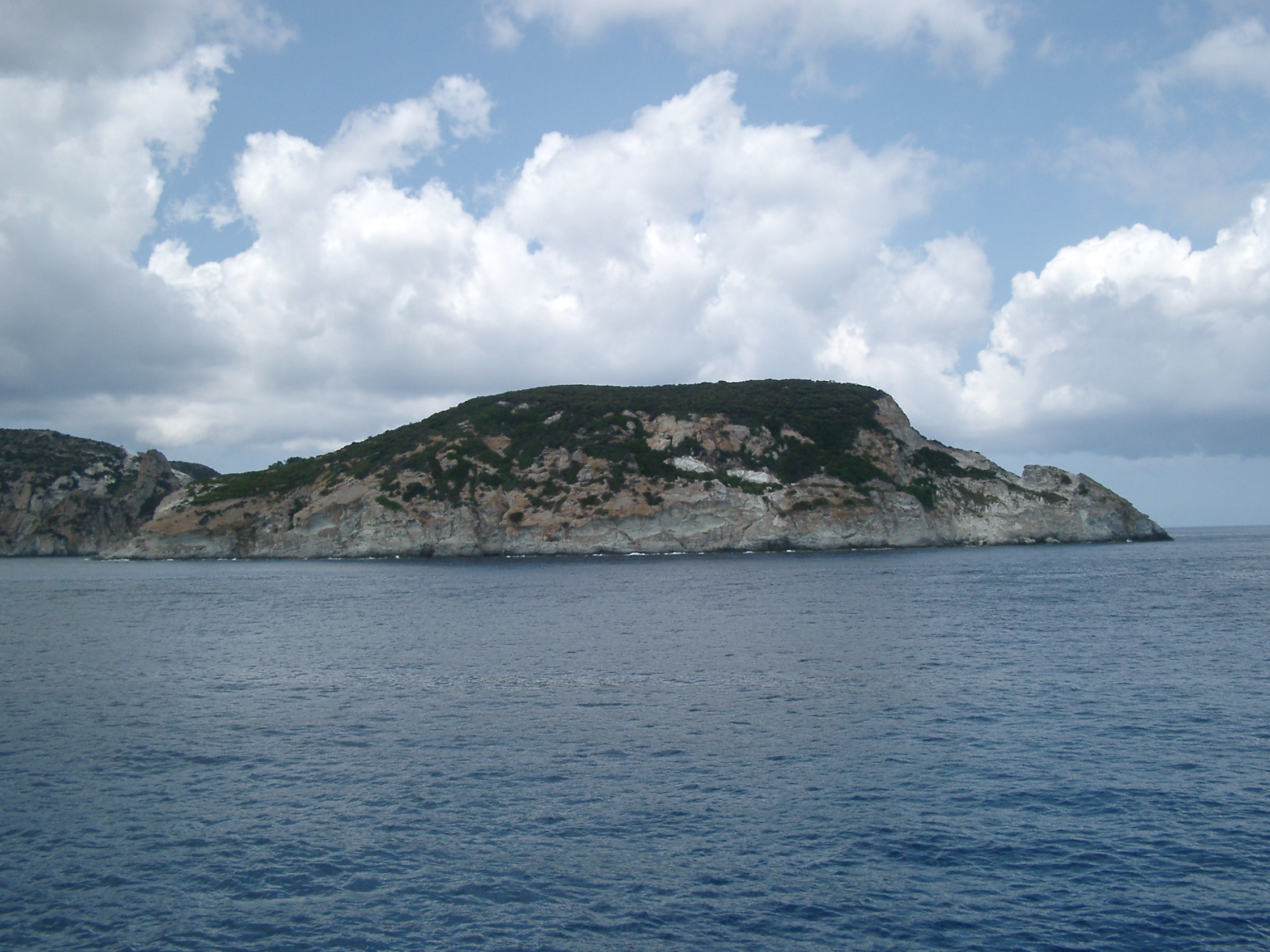 Isola di Gavi, Lazio, Italia